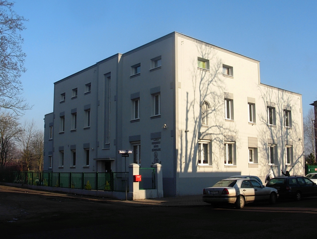 Przedszkole sióstr Elżbietanek przy ul. Leszczyńskiego na Szwederowie w Bydgoszczy